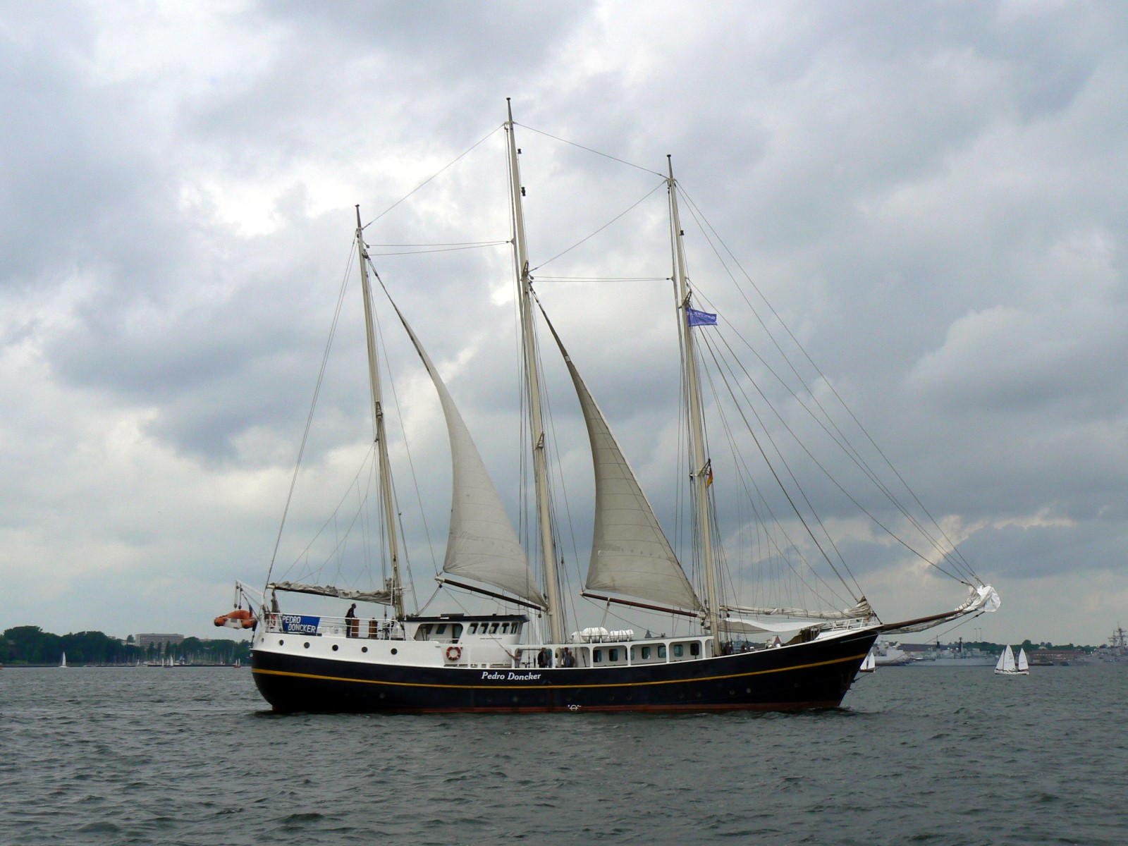 Segelschiff (Dreimastschoner) Pedro Doncker auf der Kieler Woche 2007.